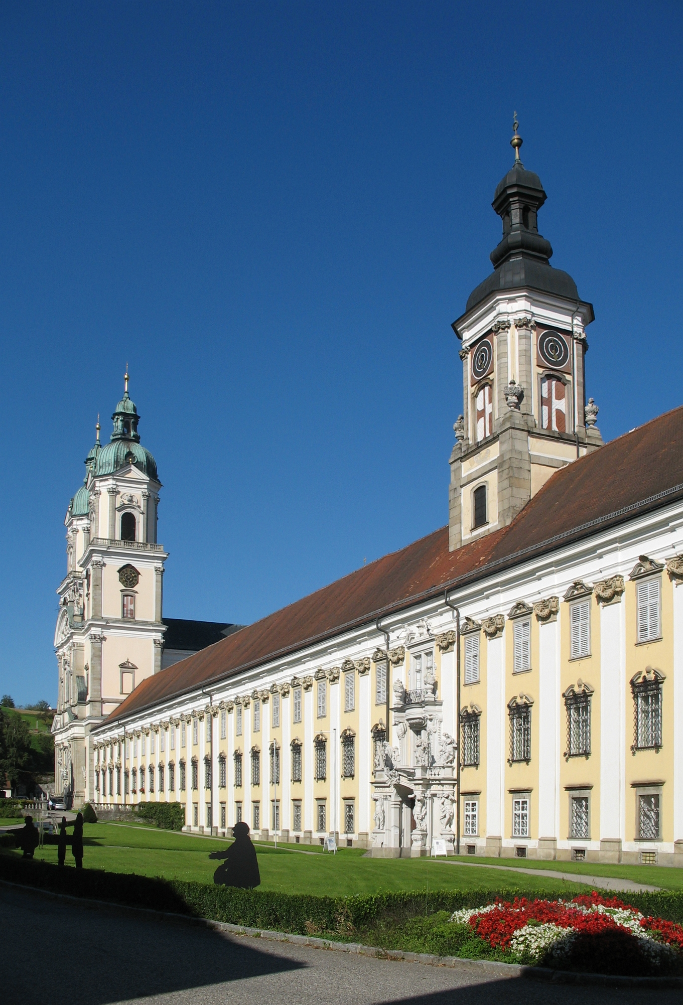 Stift St. Florian, Oberösterreich